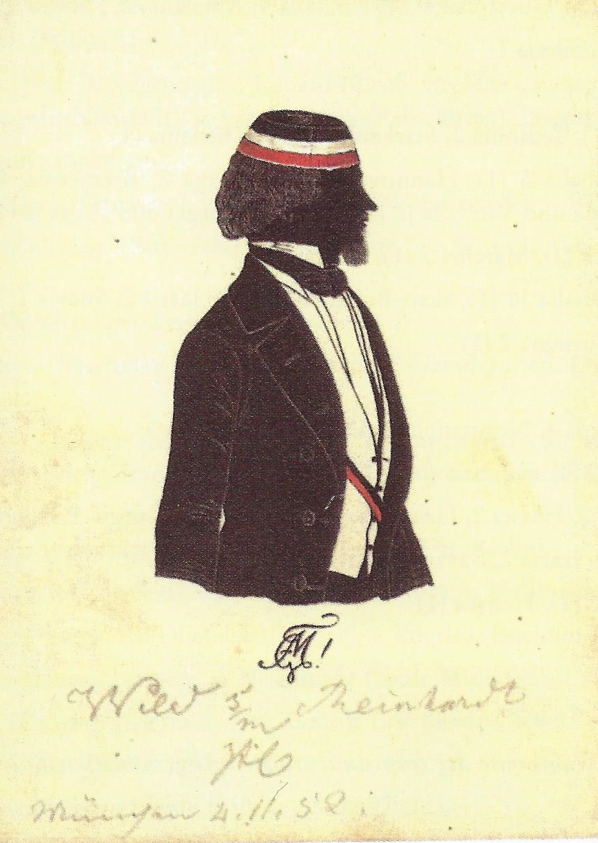 Silhouette von Albert Wild (* 1830)